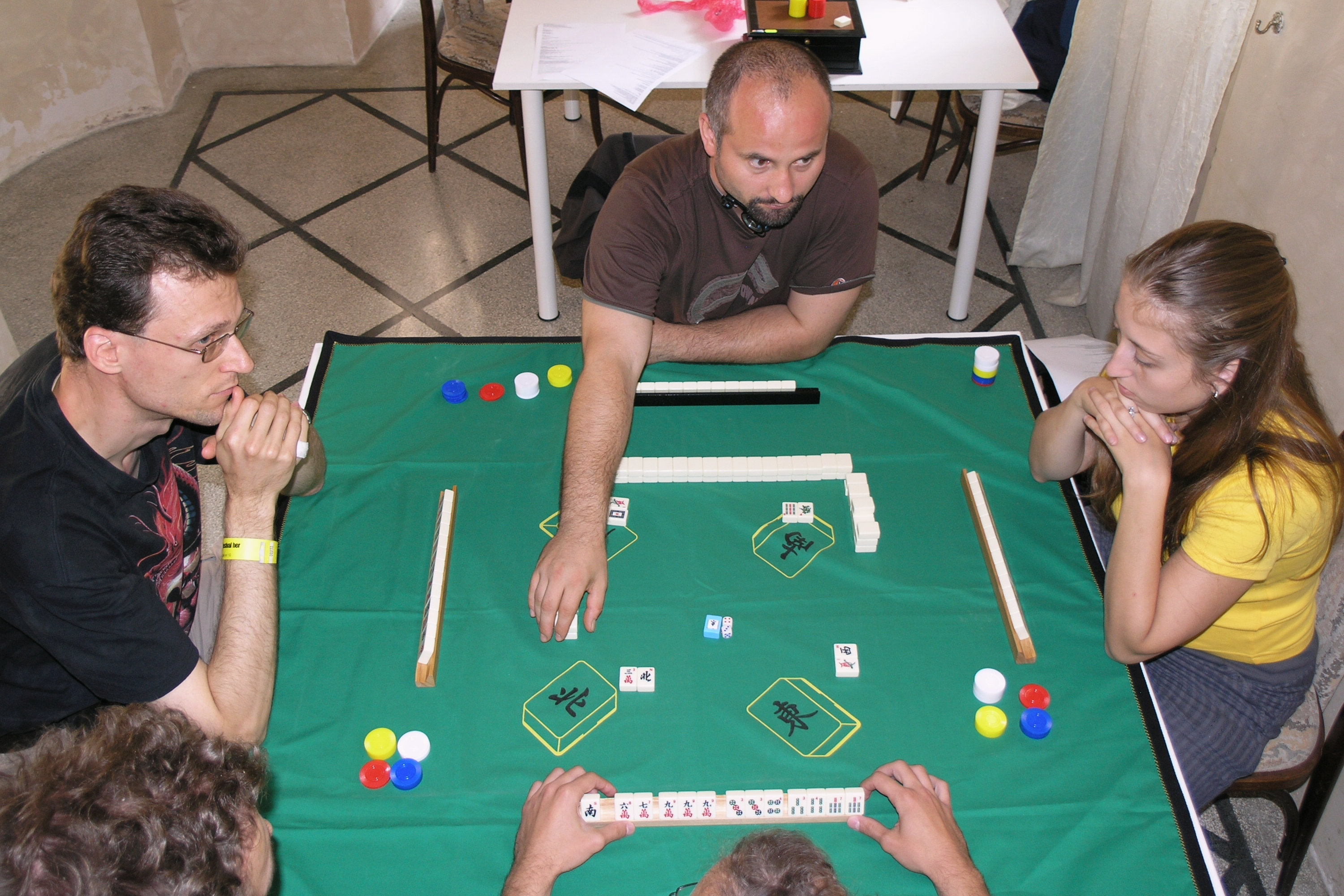 Česky: Deskohraní 2009